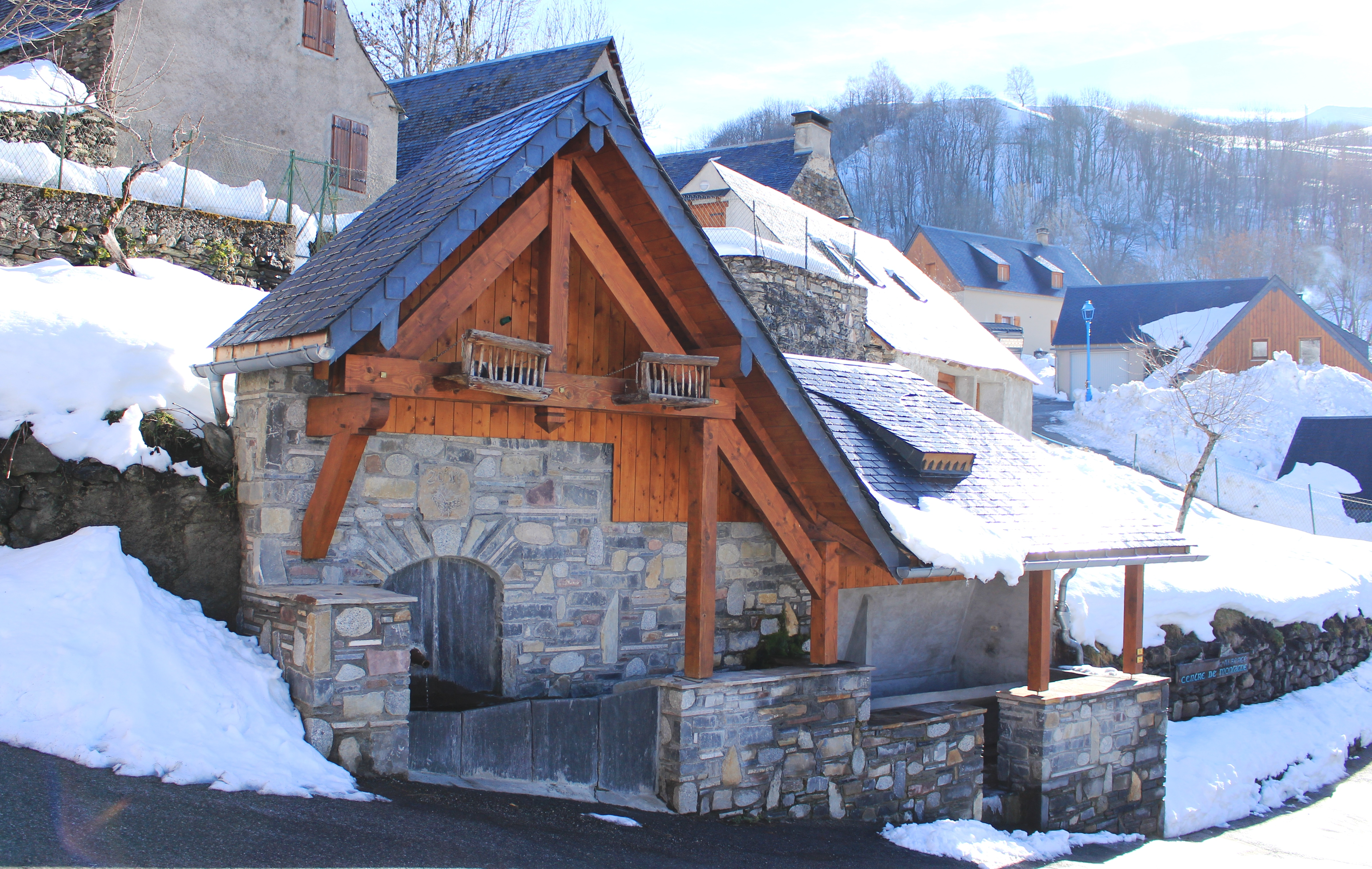 Lavoir de Germ (Hautes-Pyrénées)